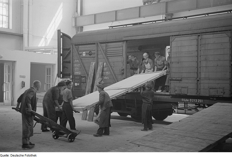 Original image description from the Deutsche Fotothek Ausladen von Gütern aus einem Wagon